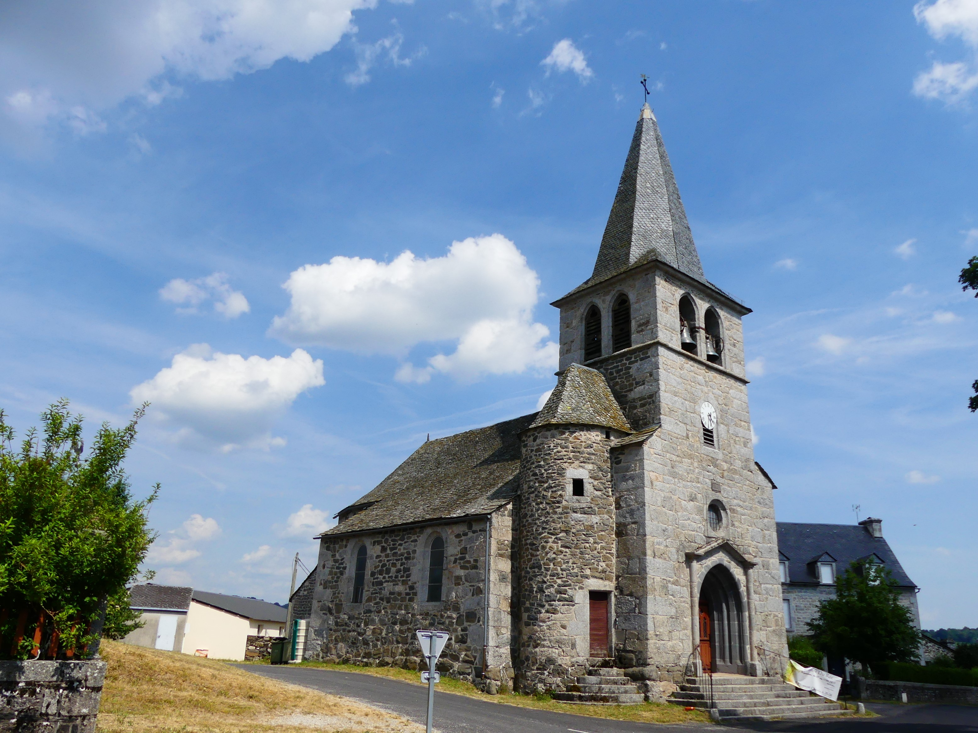 L'église d'Huparlac, Aveyron, France.